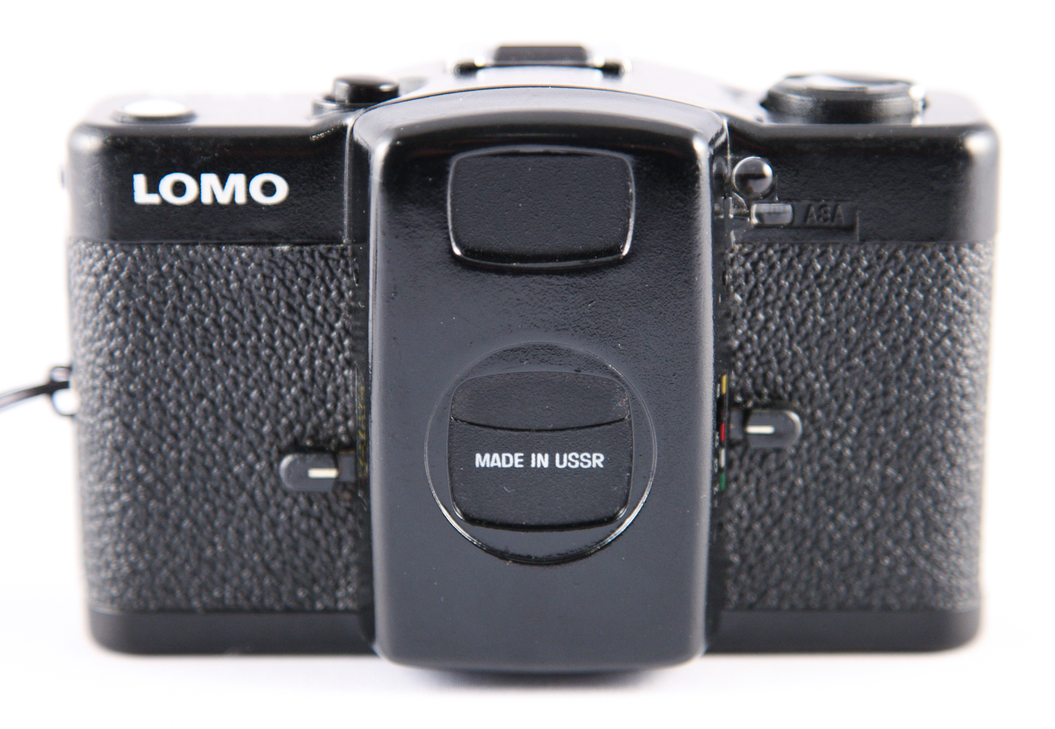 0175 Lomo LCA